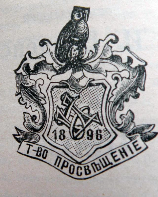 Издательская марка товарищества "Просвещение"